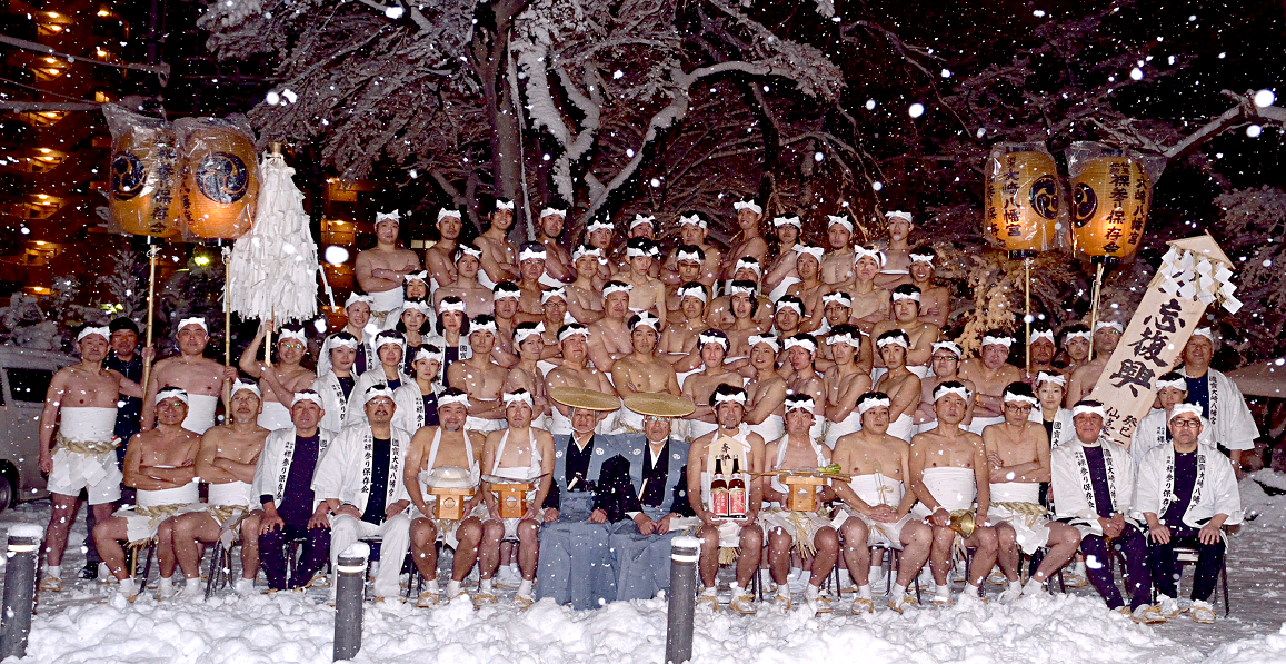 仙台大崎八幡宮松焚祭の裸参り-2013